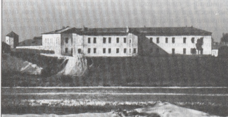 Быхаўскі замак